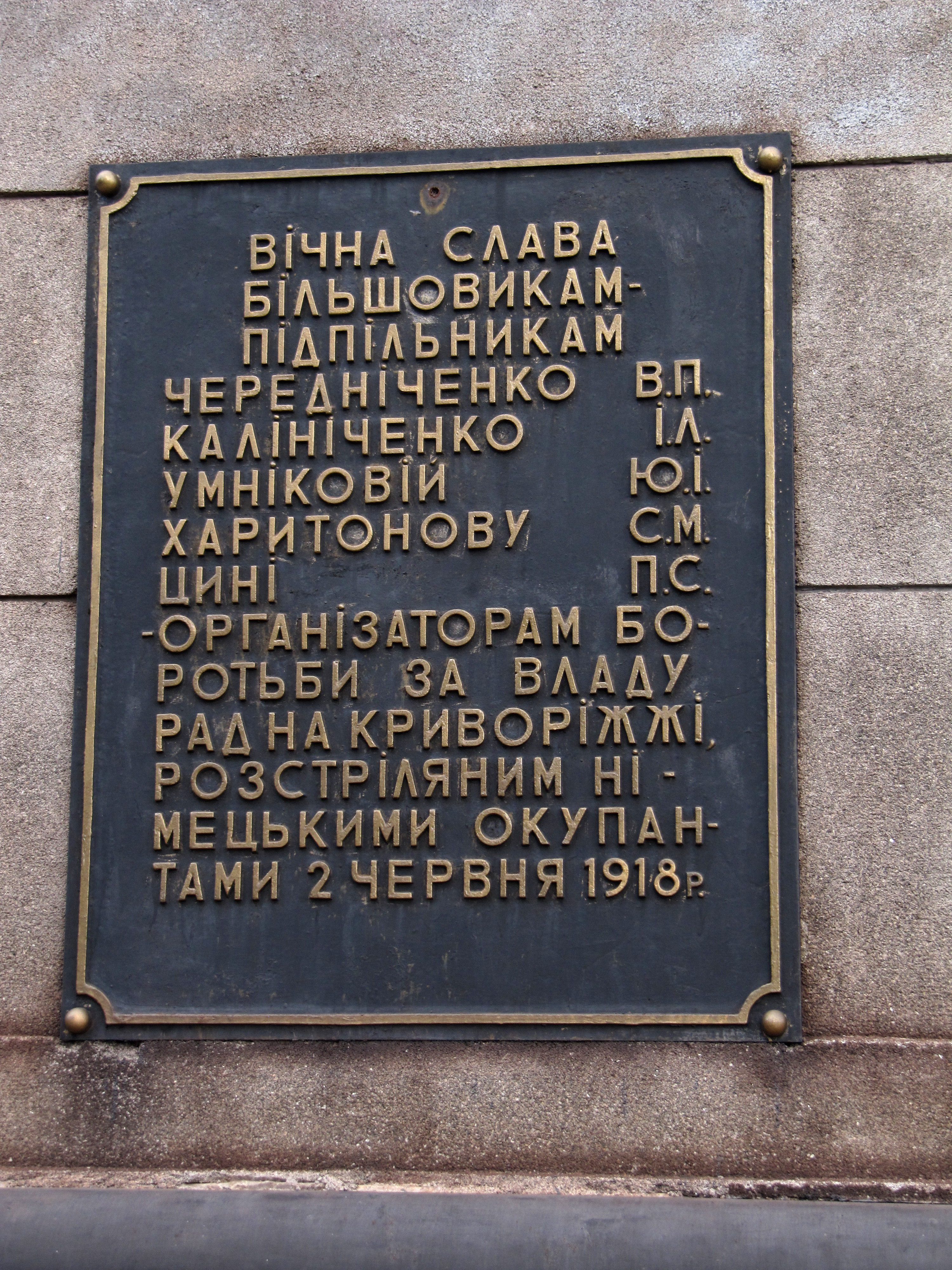 Братська могила революціонерів-підпільників